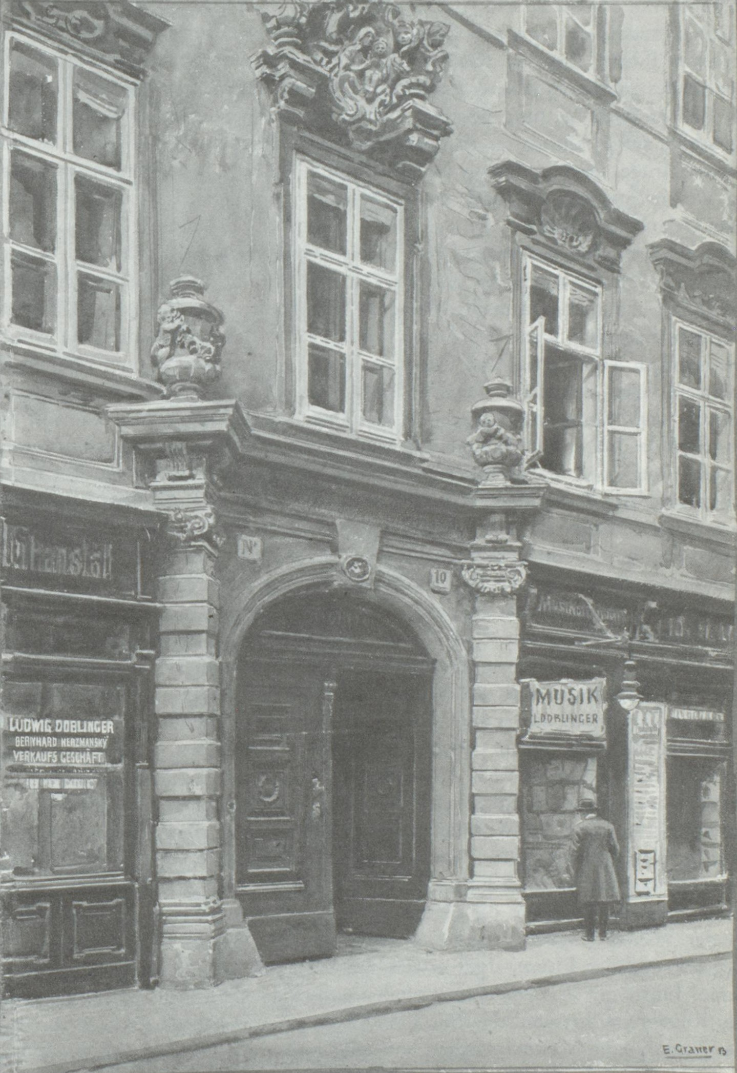 Ernst Graner Musikhaus Doblinger